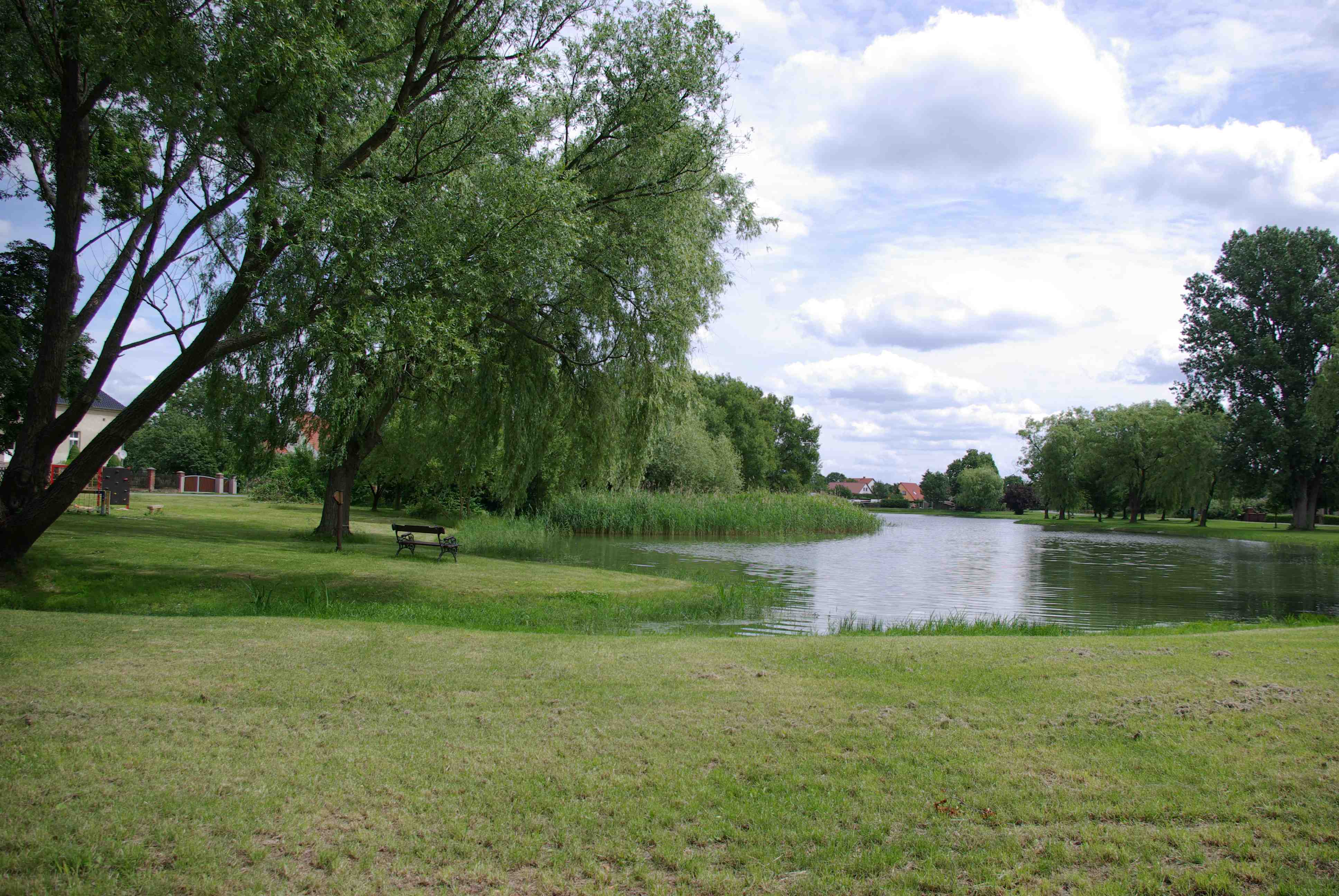 Rietz-Neuendorf in Brandenburg. Im Ortsteil die Anlage des Ortsteils Lamitsch um den Teich herum. Die Anlage steht unter Denkmalschutz.